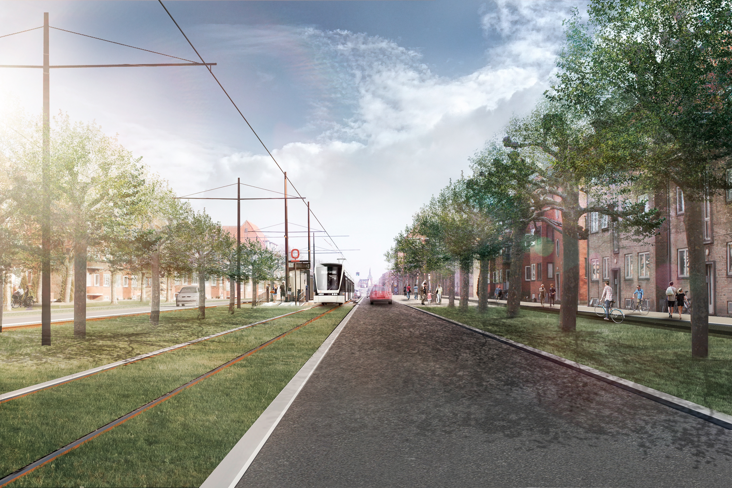 Letbanetracé med græsbeklædning og træer